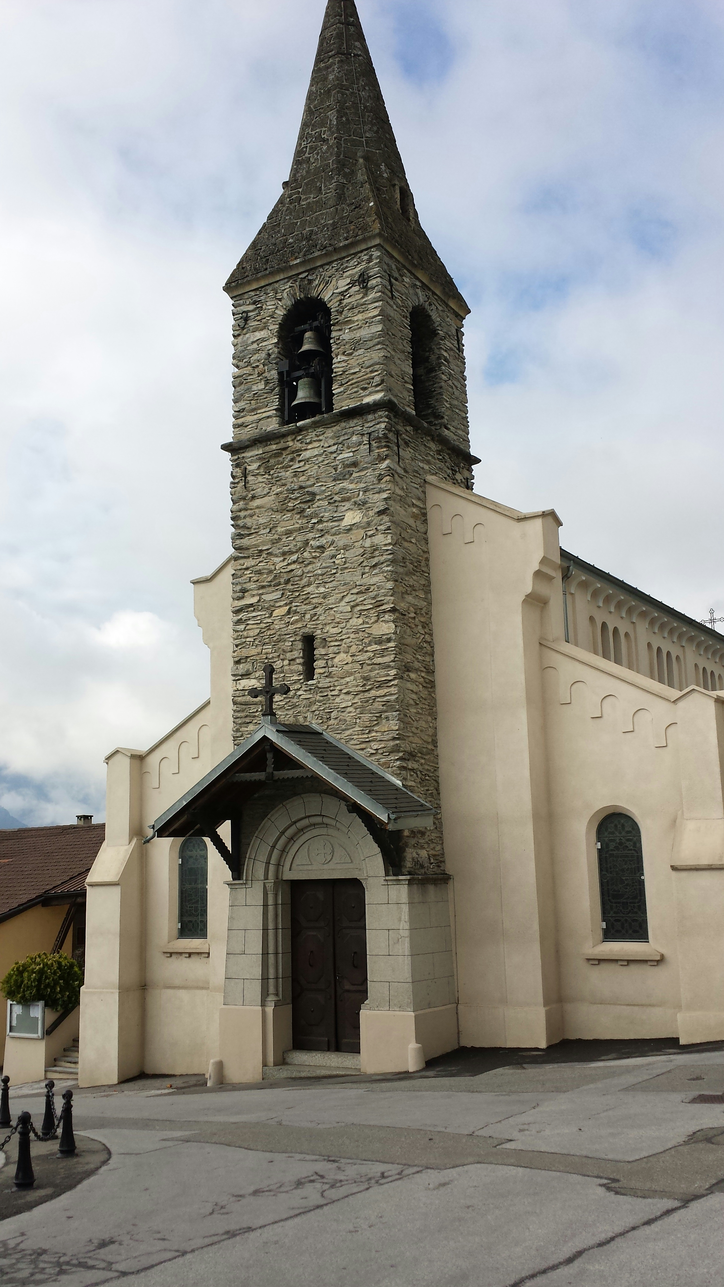 Kirche Sainte-Marie-Madeleine